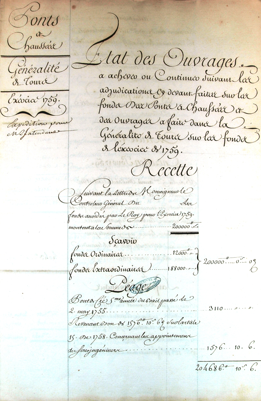 Page de couverture des états des ouvrages de la généralité de Tours (exercice 1759).title QS:P1476,fr:"Page de couverture des états des ouvrages de la généralité de Tours (exercice 1759)." label QS:Lfr,"Page de couverture des états des ouvrages de la généralité de Tours (exercice 1759)."